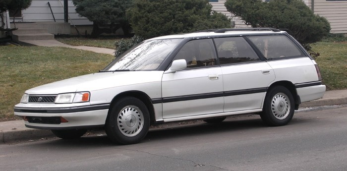 1991 Subaru Legacy LS wagon